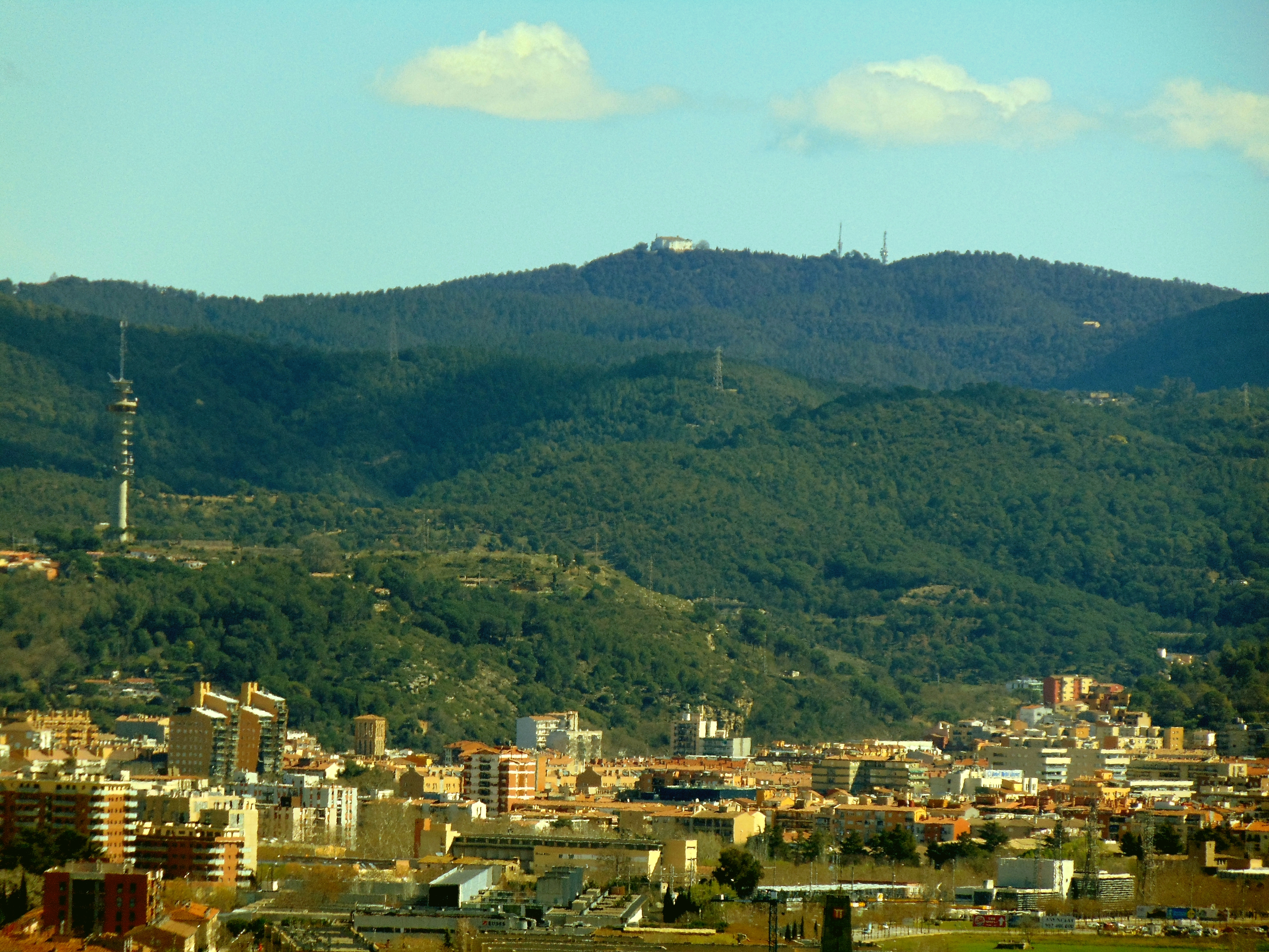 Santuari de la Mare de Déu dels Àngels (Sant Martí Vell)